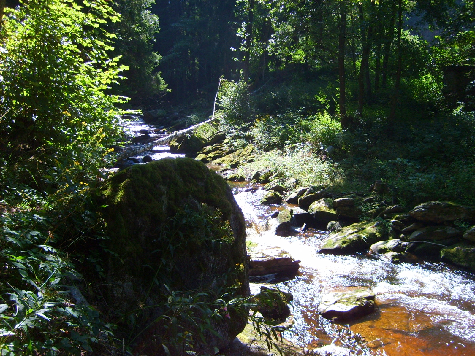 Černá river in Benešov nad Černou